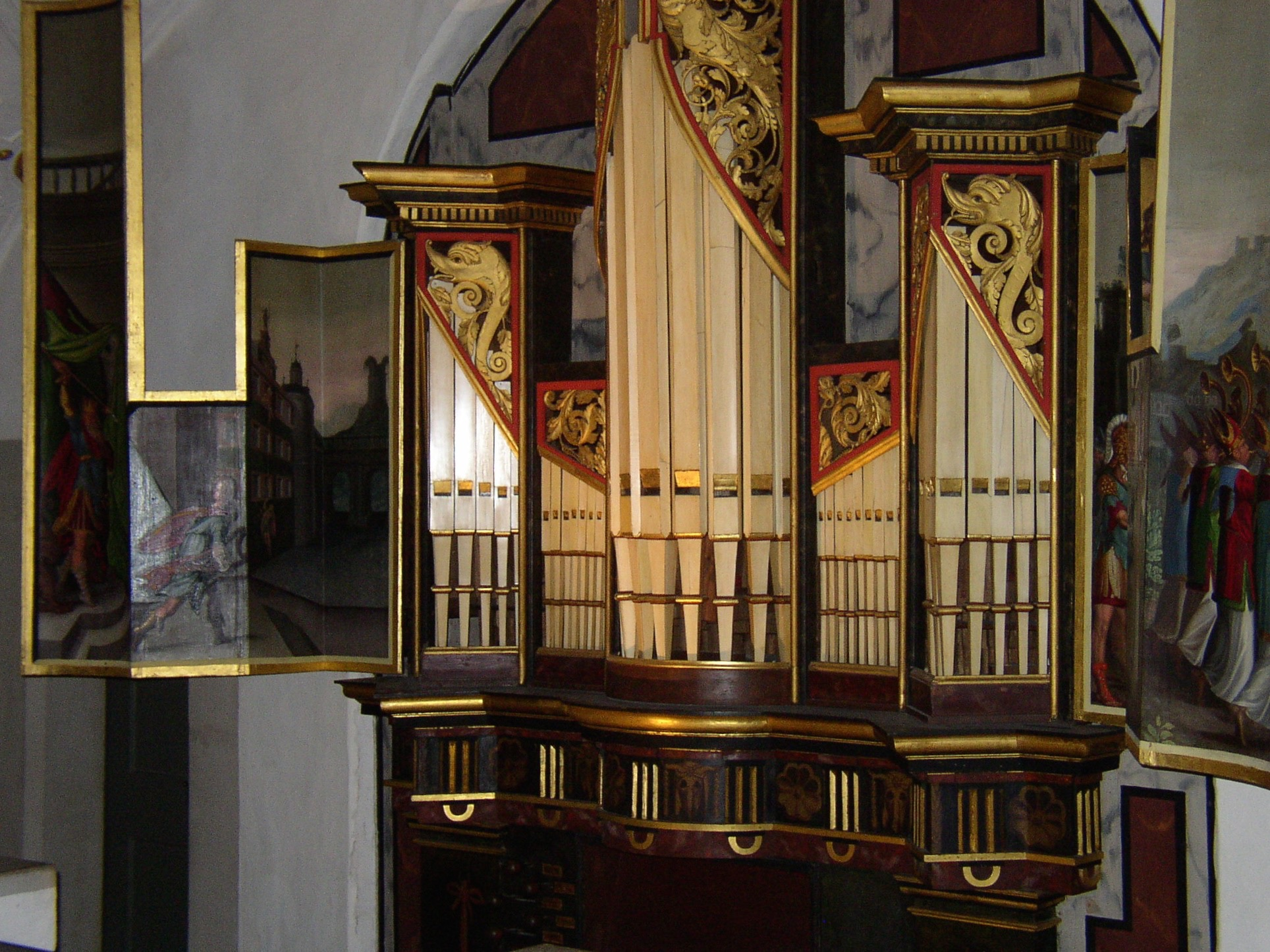 Renaissance-Orgel der Schlosskirche (Schloss Wilhelmsburg) in Schmalkalden